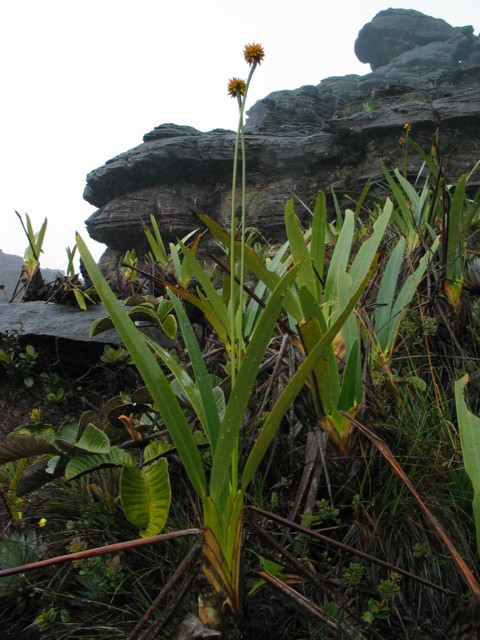 Stegolepis_guianensis auf dem Roraima-Tepui in Venezuela